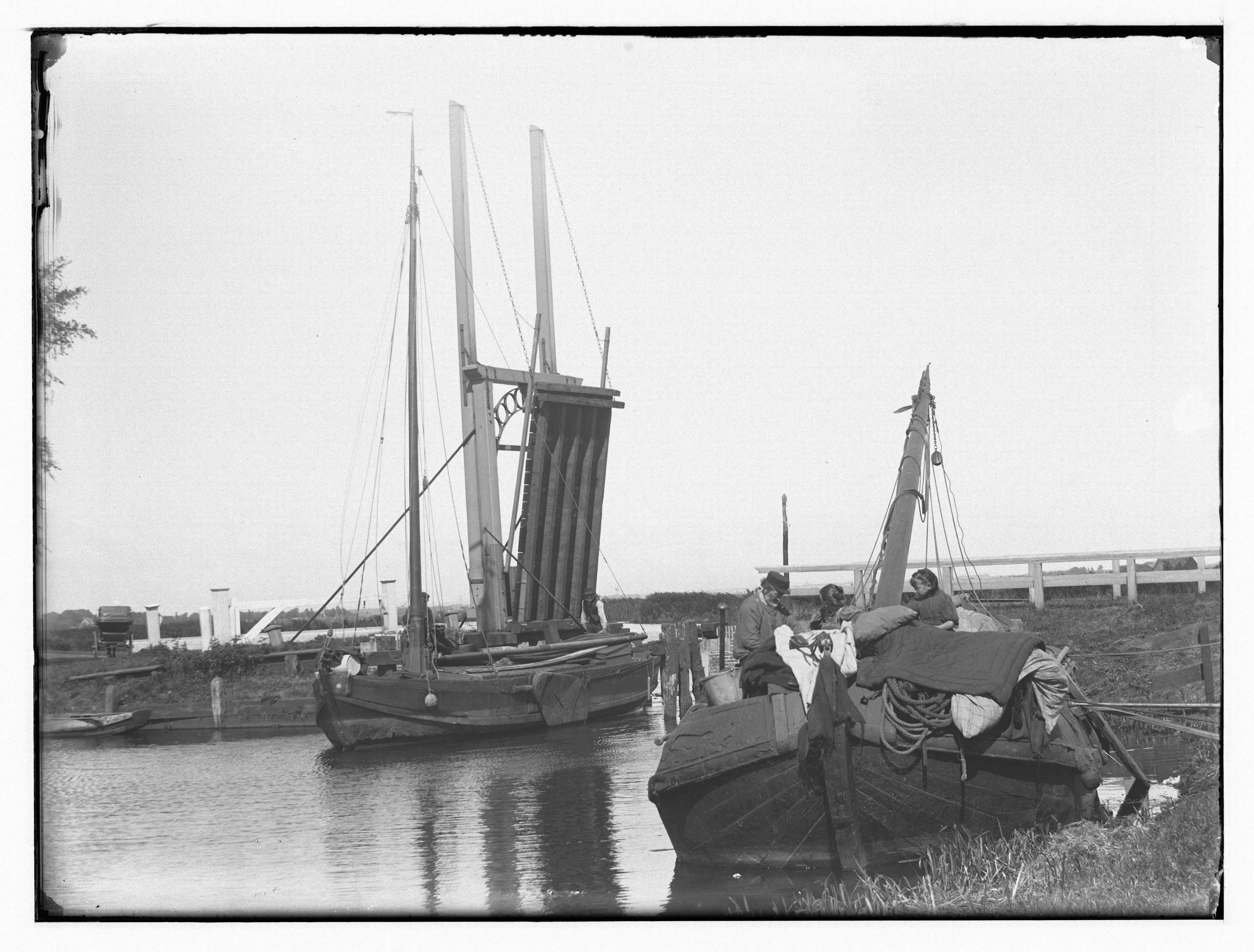 Beschrijving Ouderkerk aan de Amstel (gemeente Ouder-Amstel) e.o Buurtschap Voetangel. Documenttype foto Vervaardiger Olie``, Jacob (1834-1905) Collectie Collectie Jacob Olie Jbz. Datering 12 september 1897 Geografische naam Ouderkerk aan de Amstel Inventarissen Afbeeldingsbestand 010019001090 Generated with Dememorixer